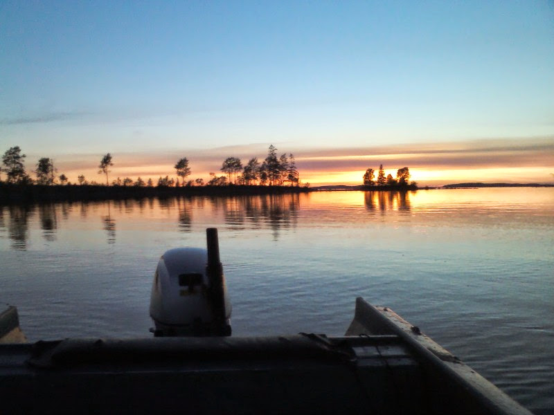 Челмужская коса, Медвежьегорский район This image is related to the protected area of Russia number 1010096